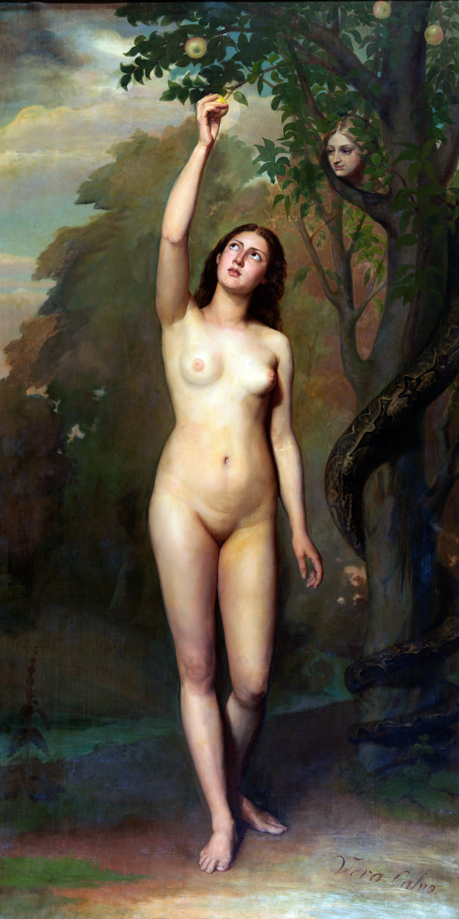 El lienzo representa a Eva, primera mujer de la Creación y esposa de Adán, con quien engendró a los hermanaos Caín y Abel.